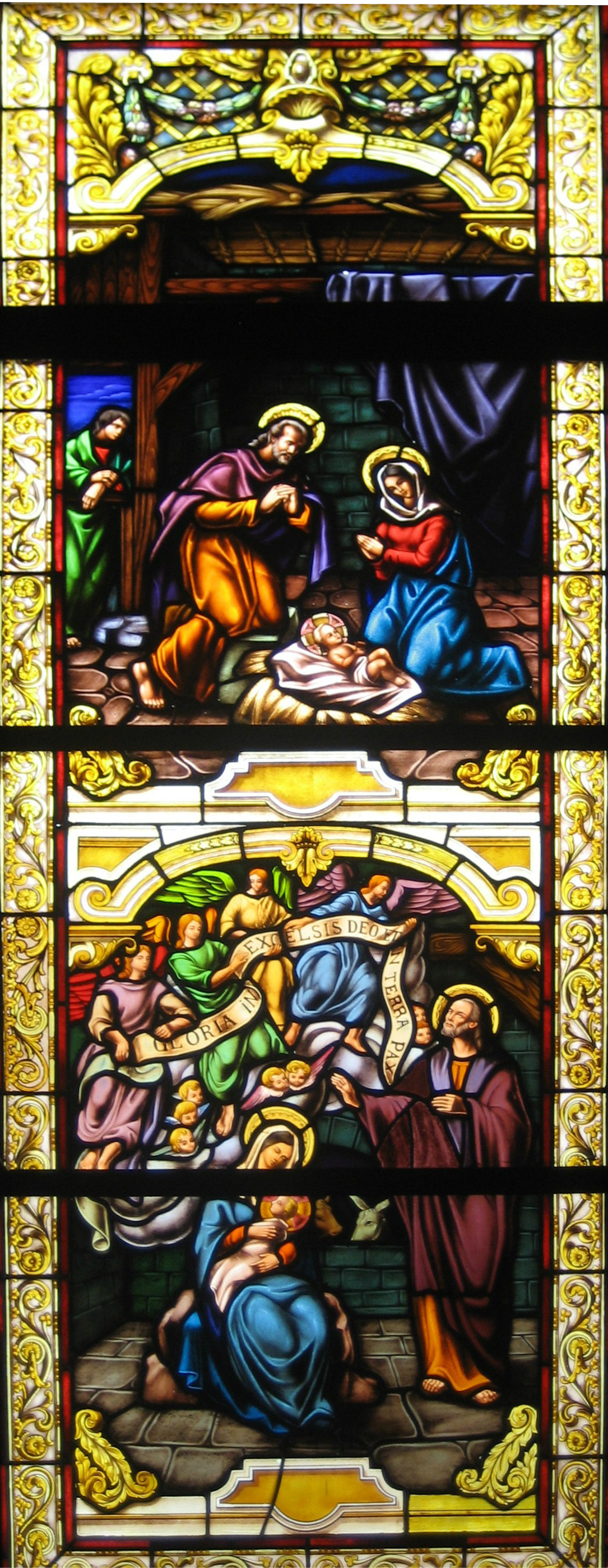 Cuba, Parroquia de San José de Jatibonico: 2-Vitral de la Natividad.